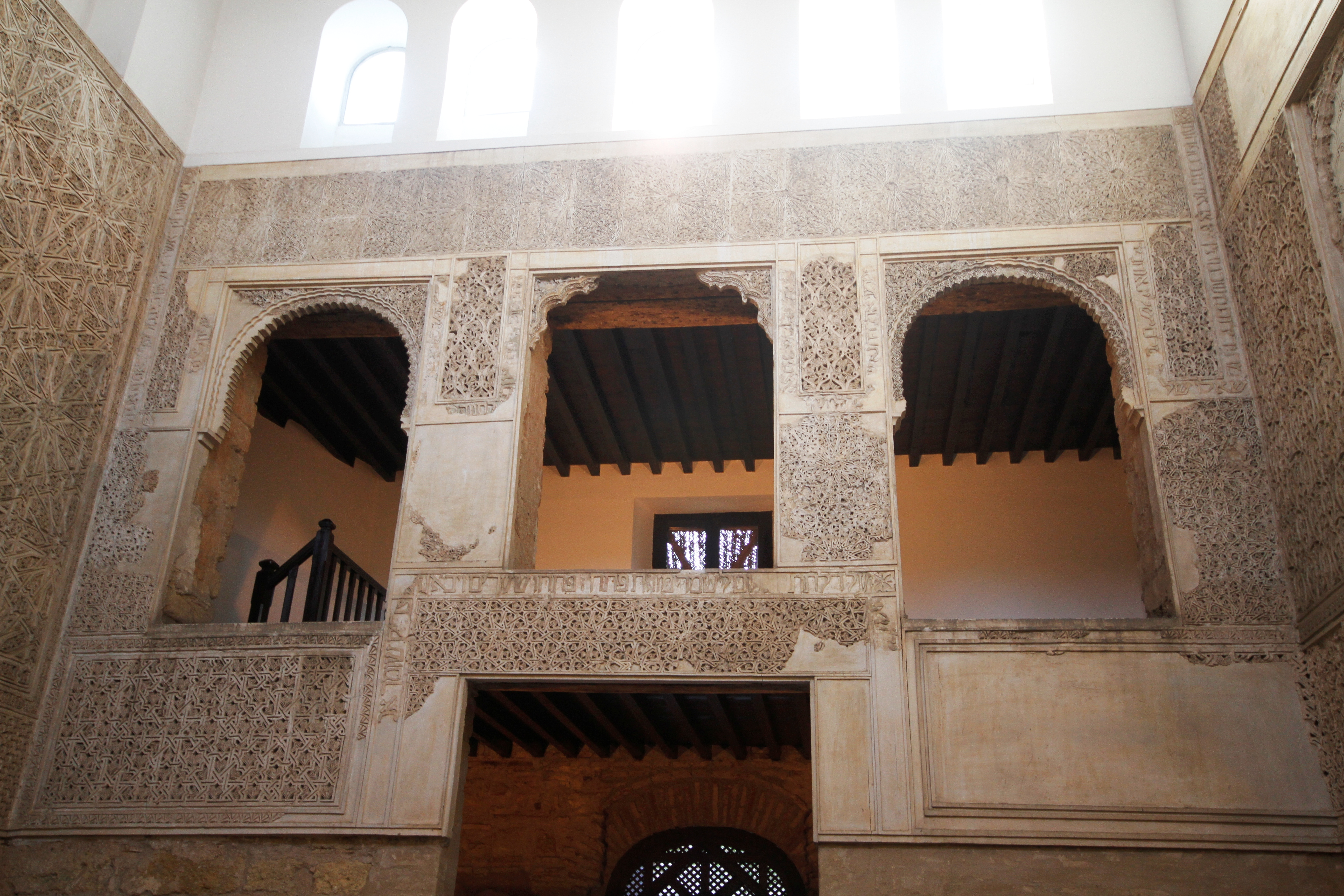 Sinagoga